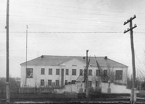 Школа Скородное 50-60 лет